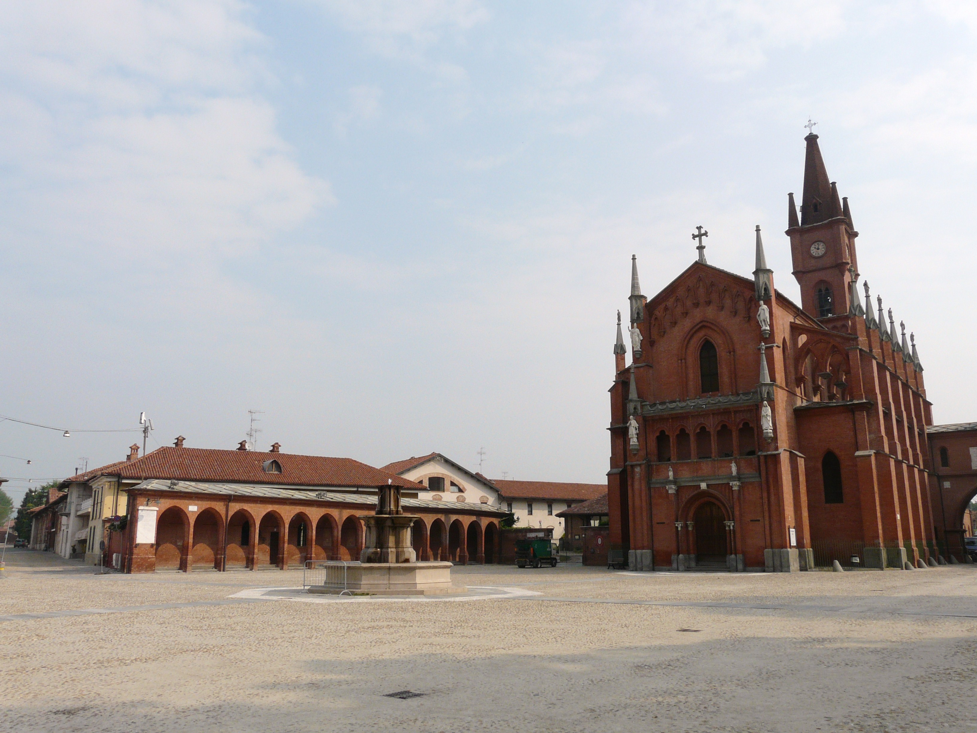 Piazza Vittorio Emanuele II, Pollenzo, Comune di Bra, Piemonte, Italia